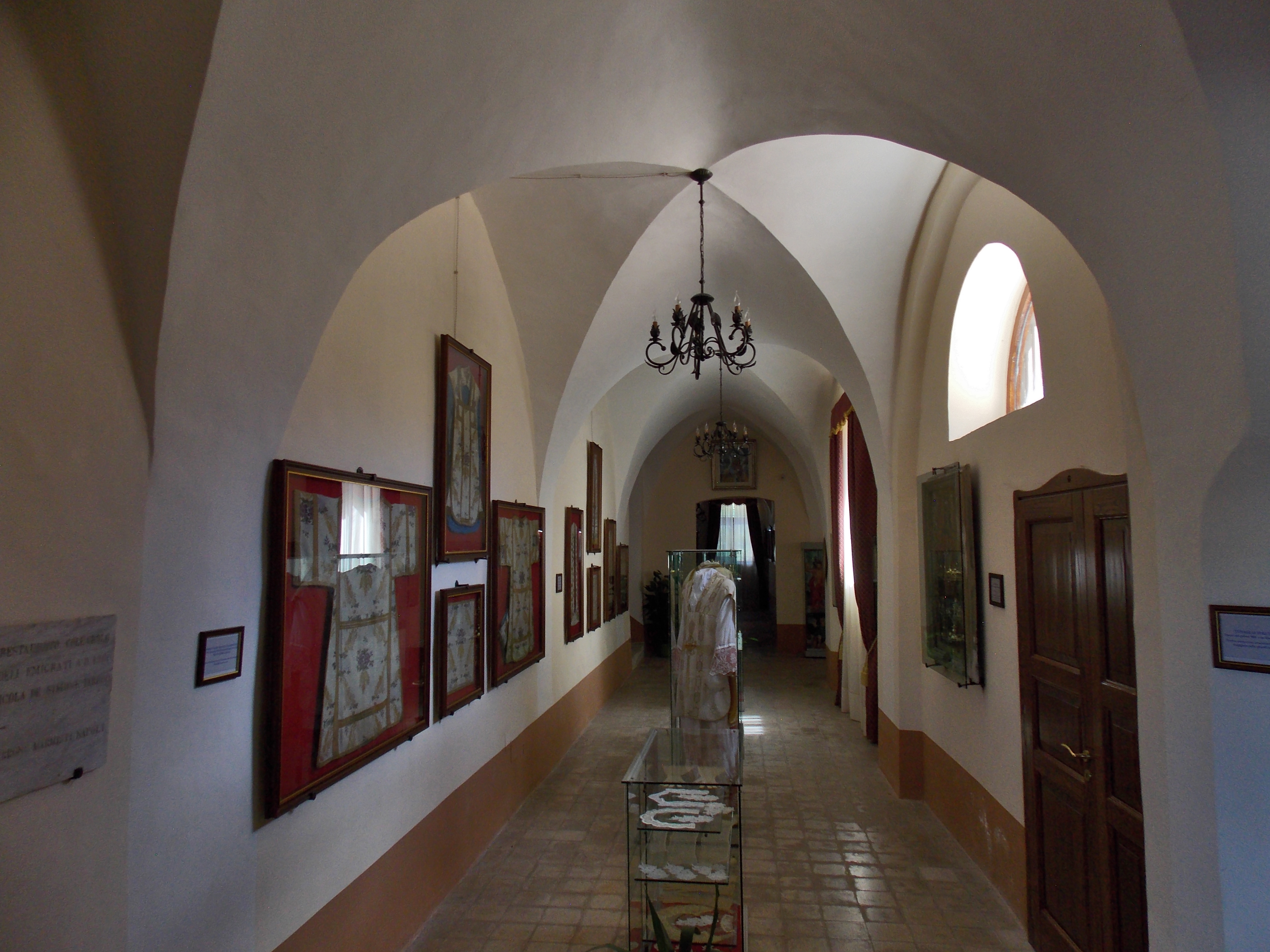 Il santuario della Madonna del Taburno a Bucciano (BN)